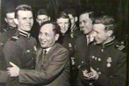 Партийно-правительственная делегация Демократической Республики Вьетнам, возглавляемая министром иностранных дел ДРВ Нгуен Зуй Чинем, посетила гвардейский, Путиловско-Кировский зенитно-ракетный полк Московского округа ПВО. Руководителя вьетнамской делегации приветствует гвардии ст. сержант Николай Колесник, награжденный орденом Боевого Красного Знамени и вьетнамской медалью «Дружбы». Снимок сделан 26.03.66 г. Митино